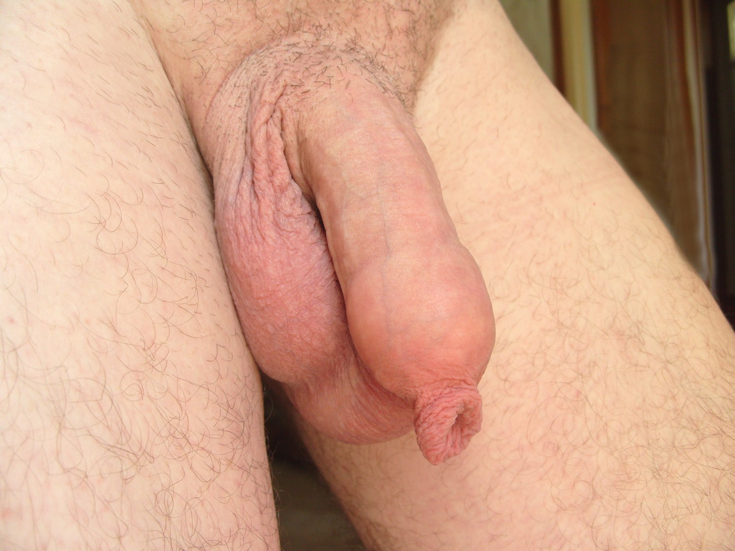 pénis non circoncis